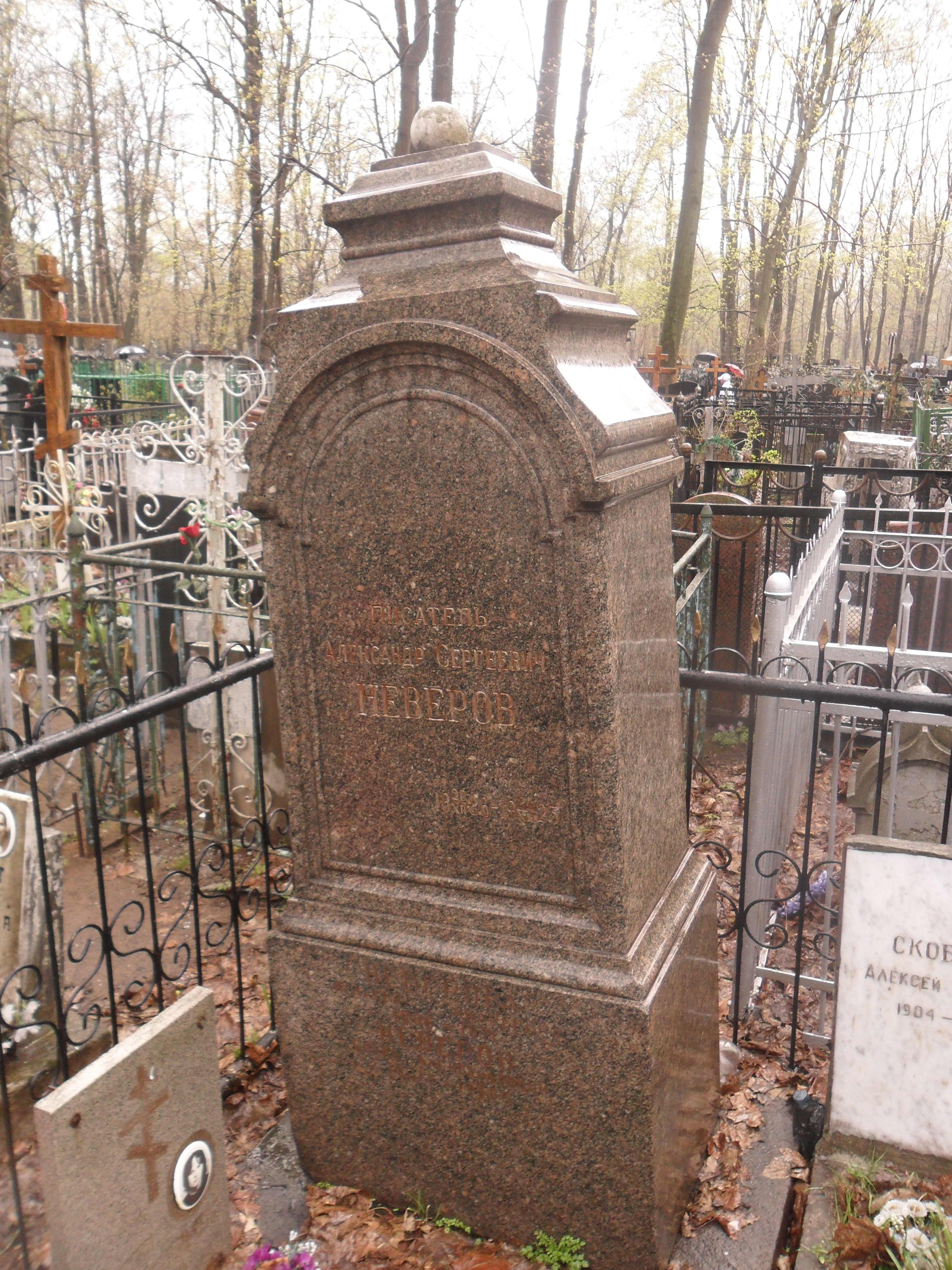 Могила писателя Александра Неверова на Ваганьковском кладбище.